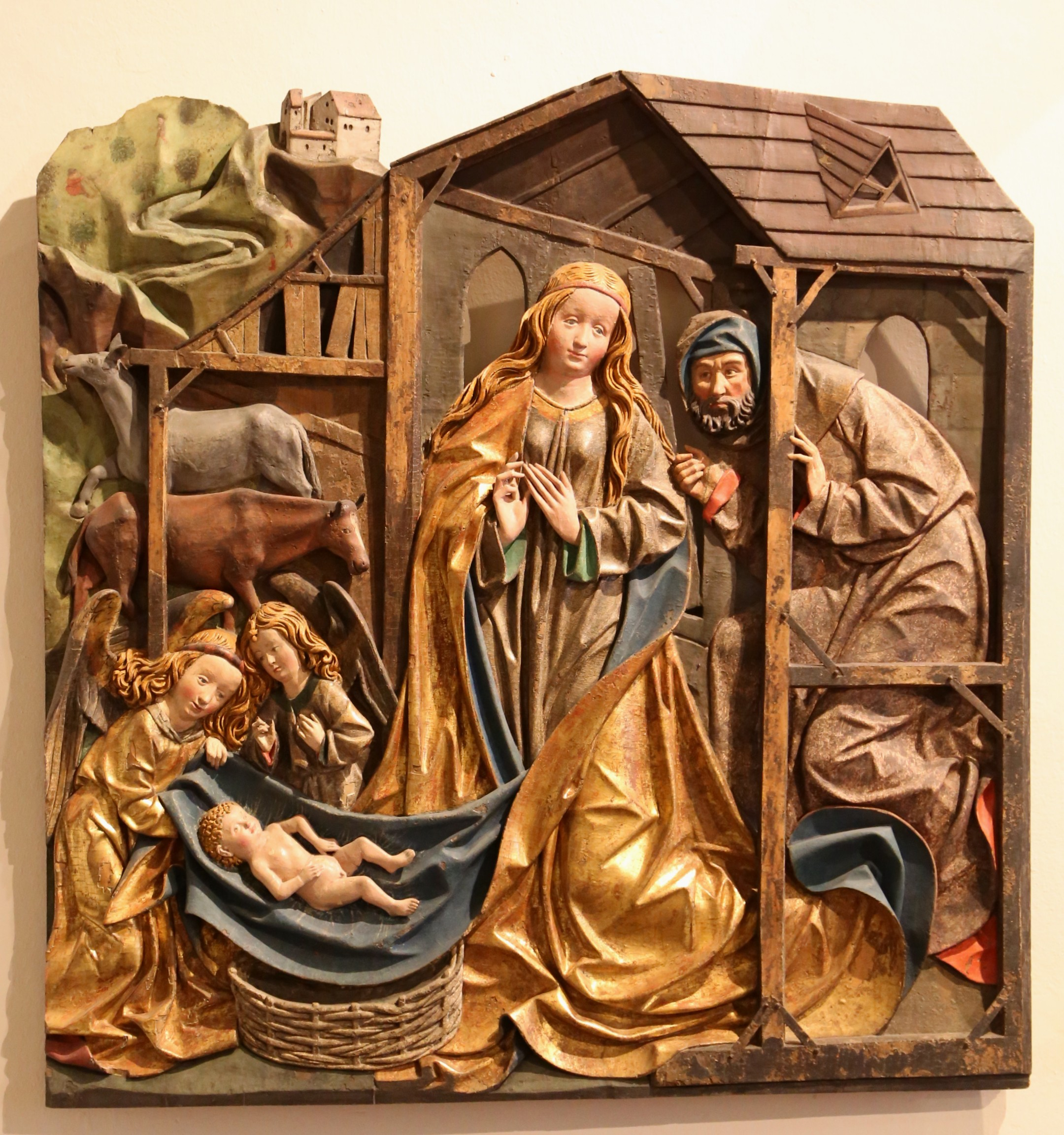 Erasmus Grasser (Umkreis): Geburt Christi; Lindenholz, farbig gefasst, aus einem Zyklus zum Marienleben aus dem herzoglichen Schloss Grünwald bei München, Bayerisches Nationalmuseum in München